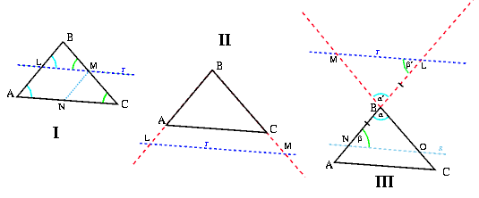 Triángulos semejantes - Teorema fundamental Dibujo original de Larocka